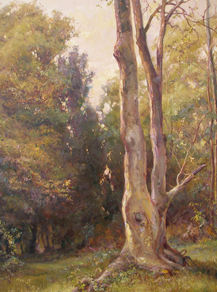 Пейзаж от Александър Алексиев - Хофарт